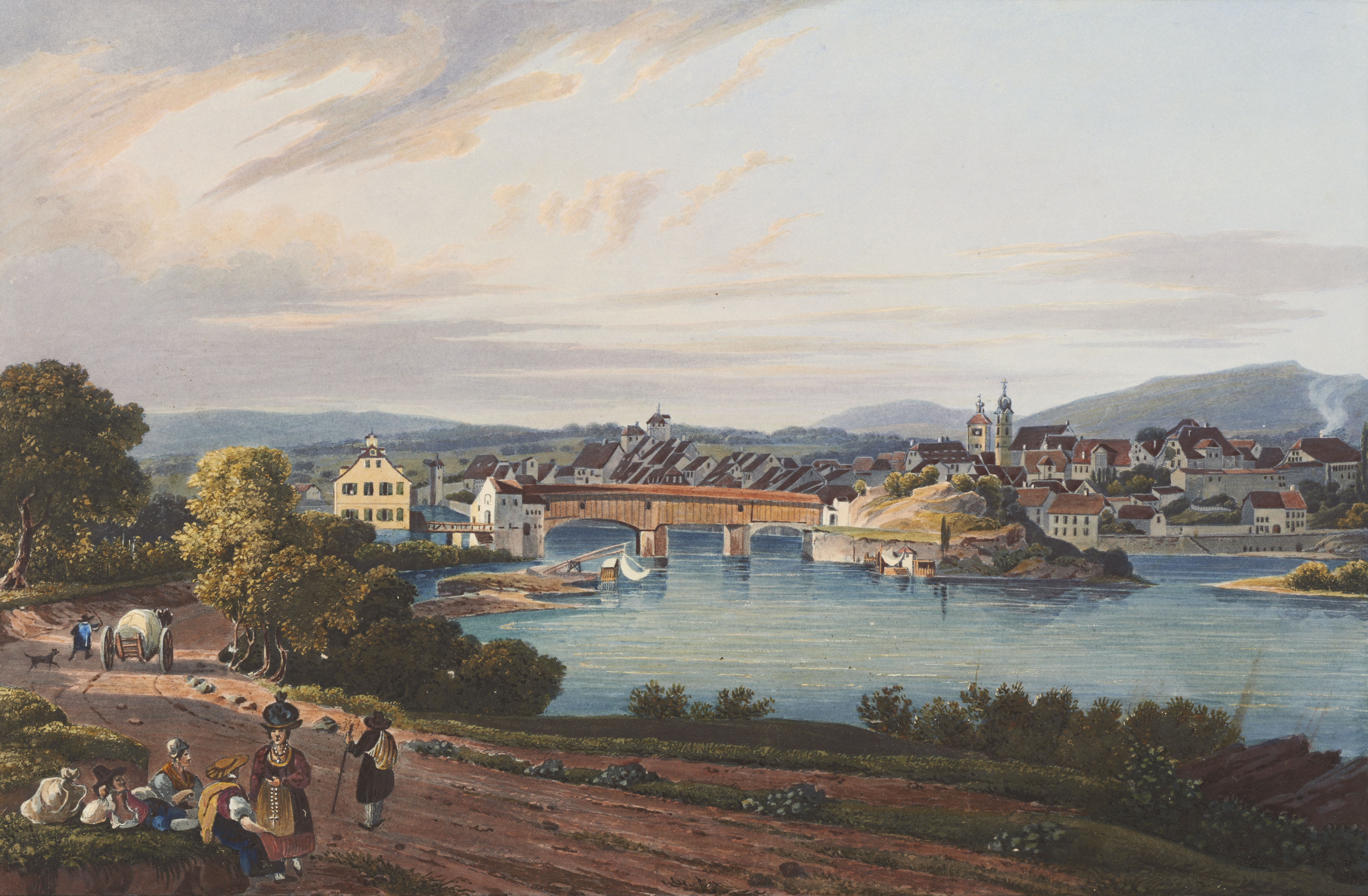 Rheinfelden, von Westen; Rheinfelden; Aquatinta, koloriert (ca. 1830)